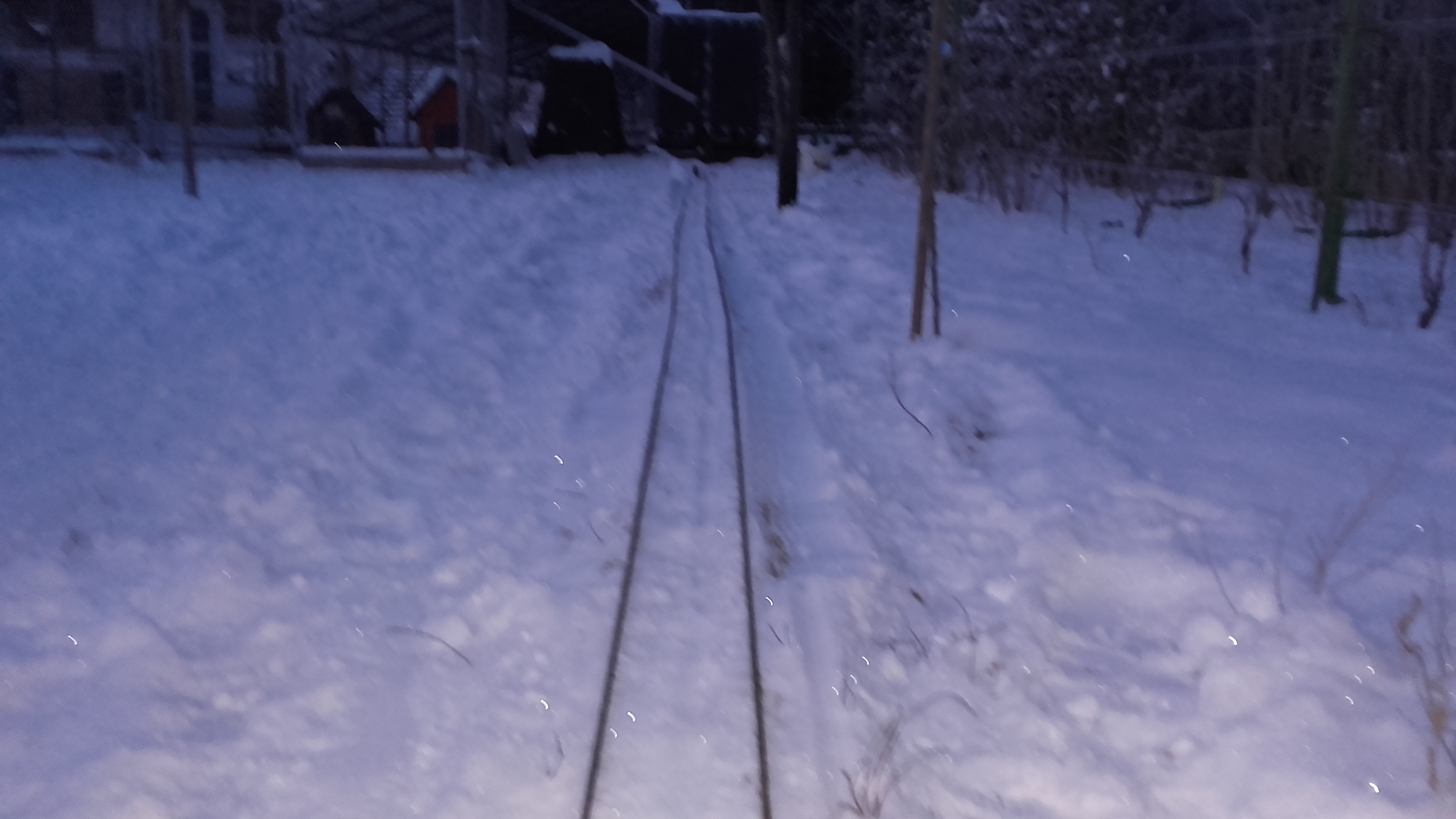 A GKV vágánya hóban